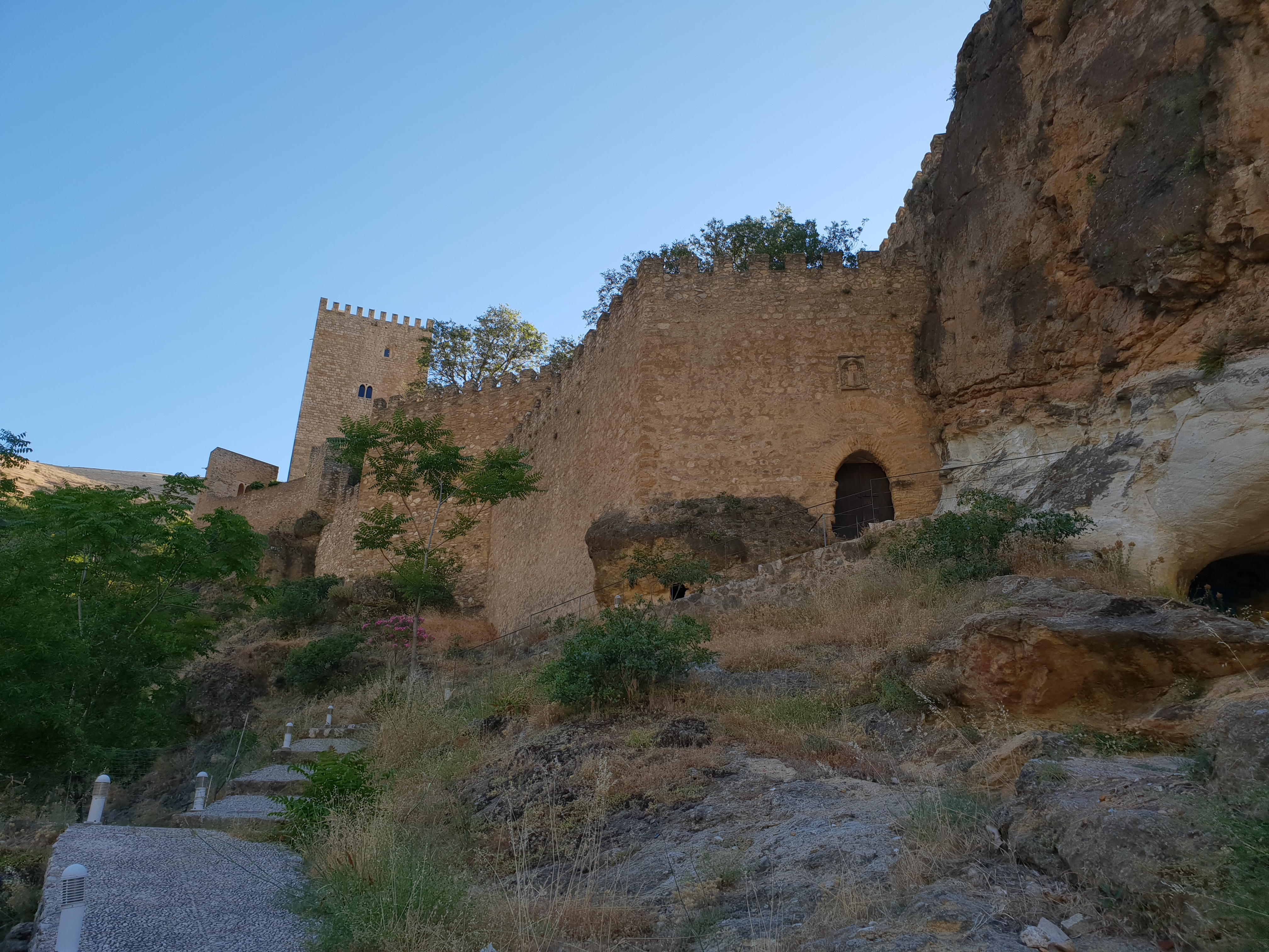 Castillo de la Yedra (Castillo de las Cuatro Esquinas)